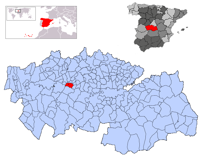 Cebolla en la provincia de Toledo